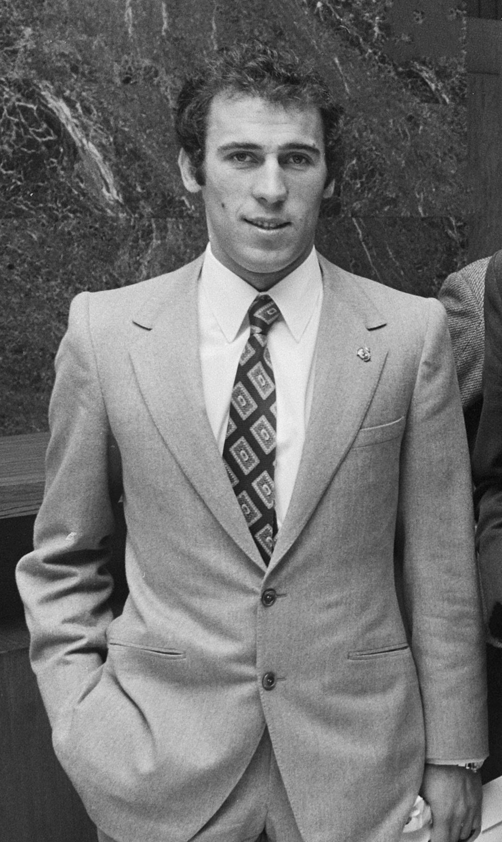 Real Madrid bezoekt het Evoluon in Eindhoven